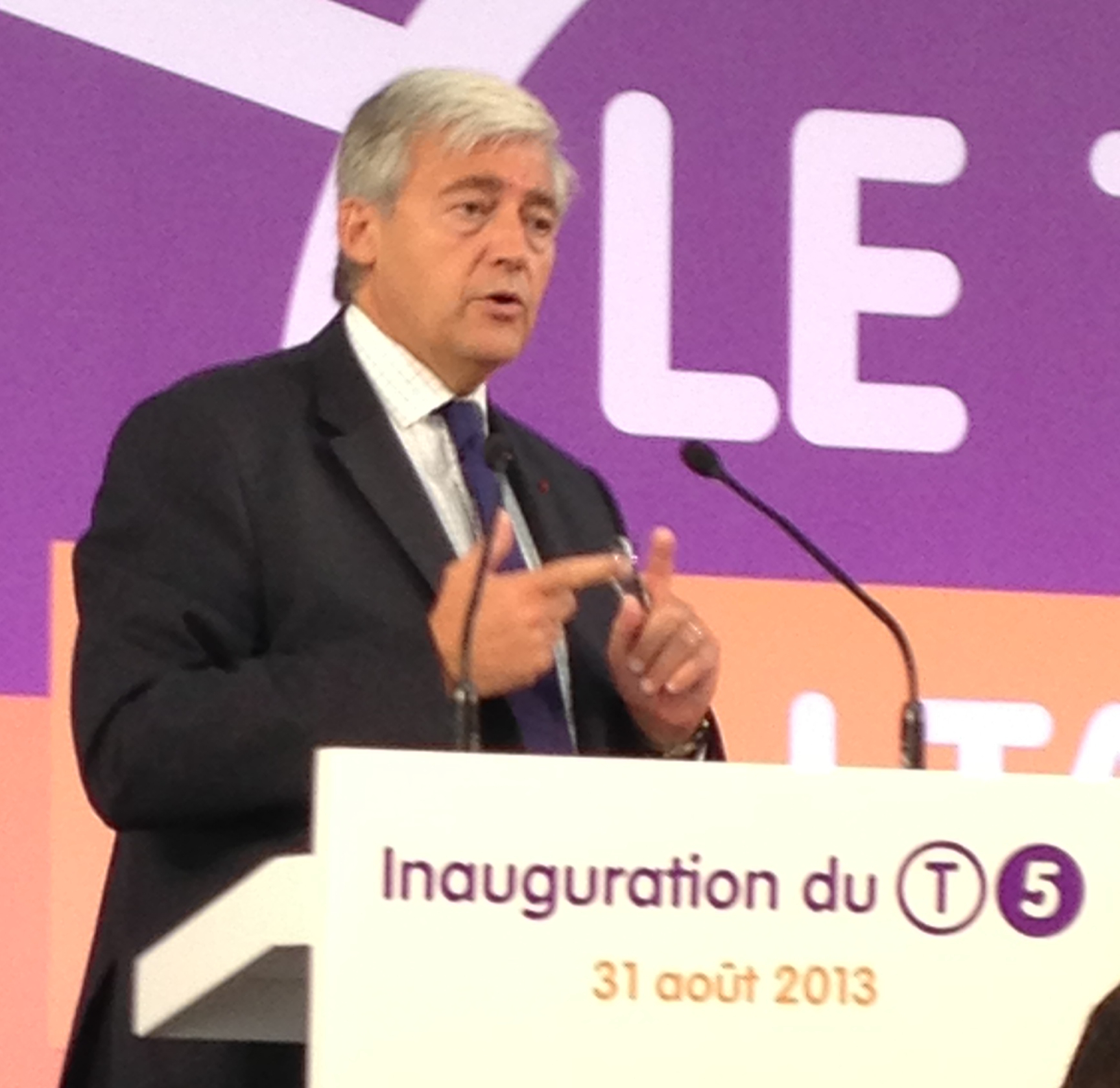 Pierre Mongin à la tribune de l'inauguration du tramway T5 le 31 août 2013 au centre de remisage de Pierrefitte-sur-Seine (93).